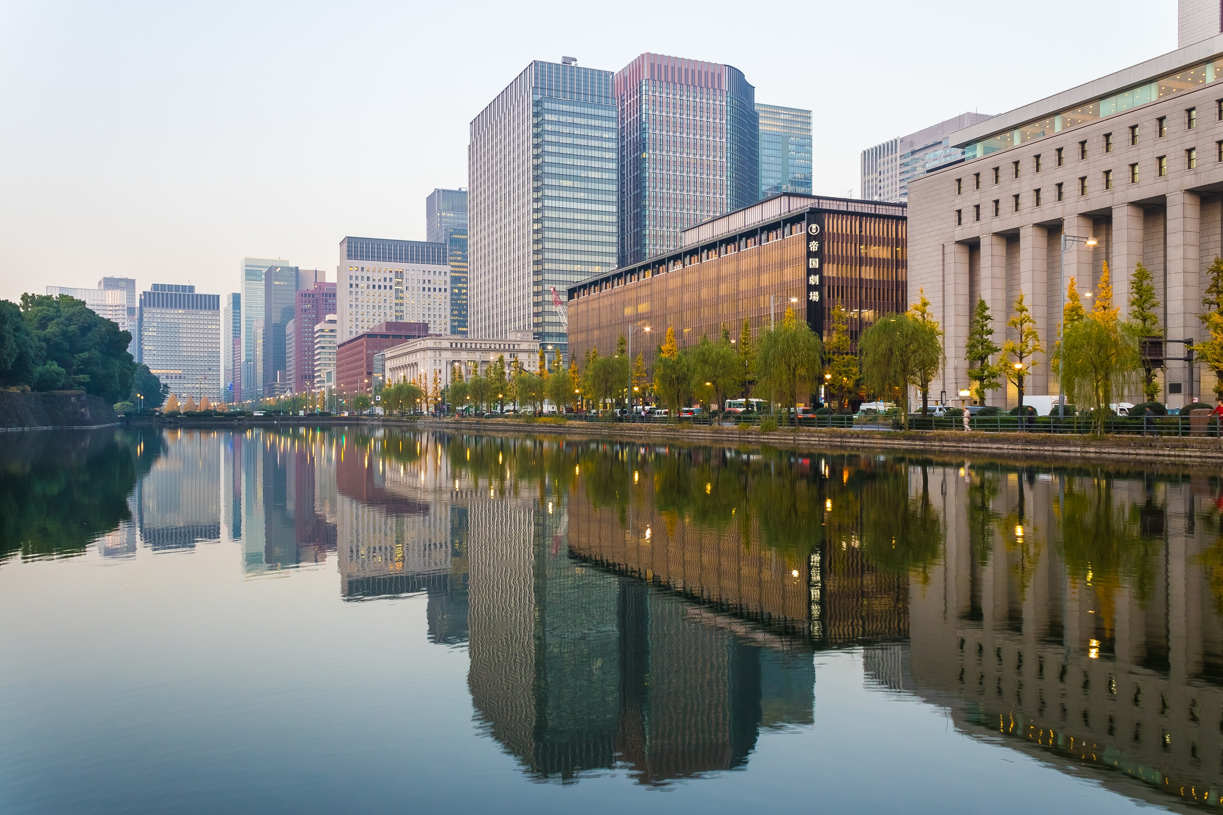 日比谷濠のビル群。